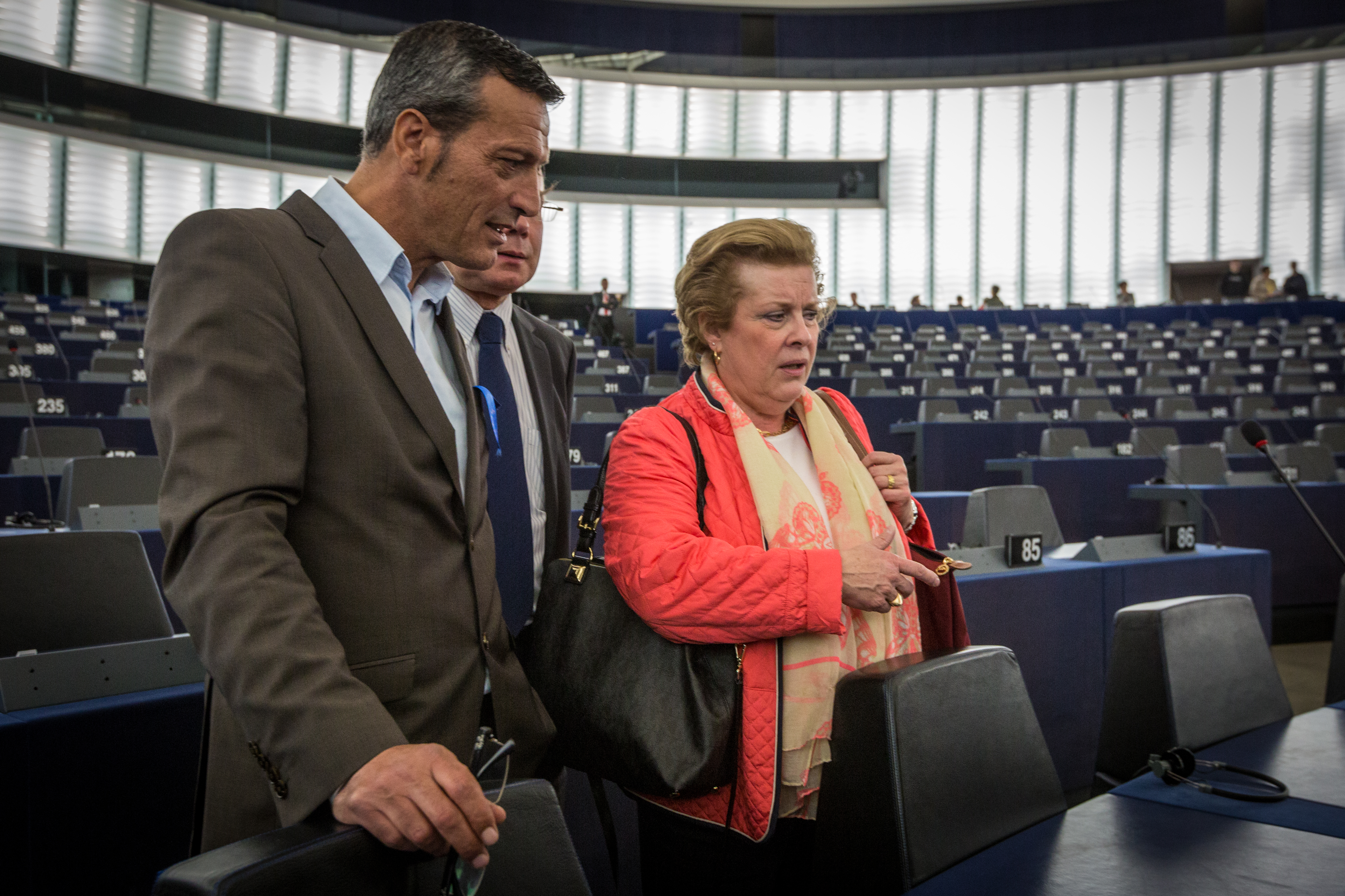 Édouard Martin et Catherine Trautmann lors des portes ouvertes au Parlement Européen à Strasbourg le 4 mai 2014.